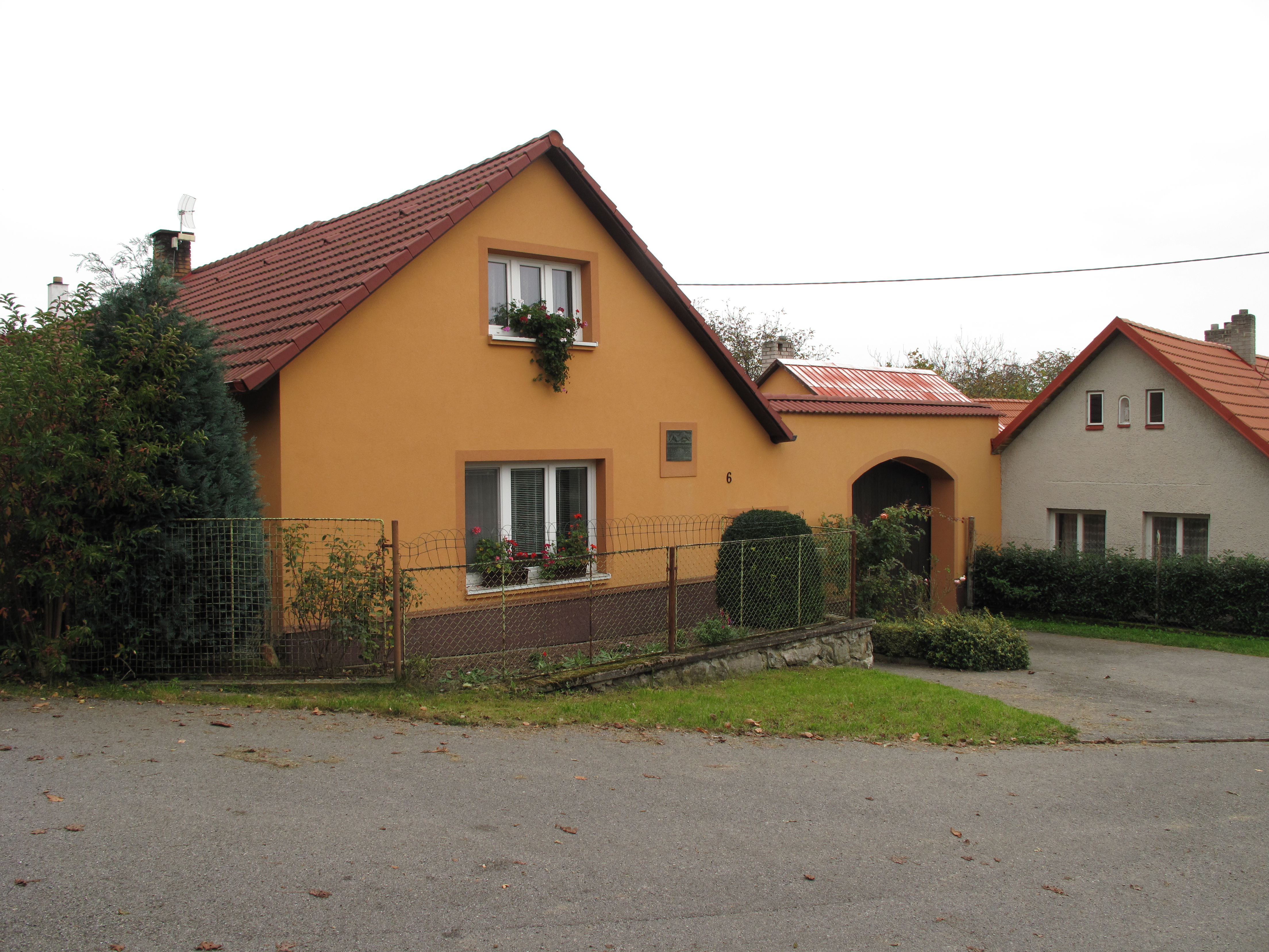 Žlutý dům v Čestíně. Okres Benešov, Česká republika.